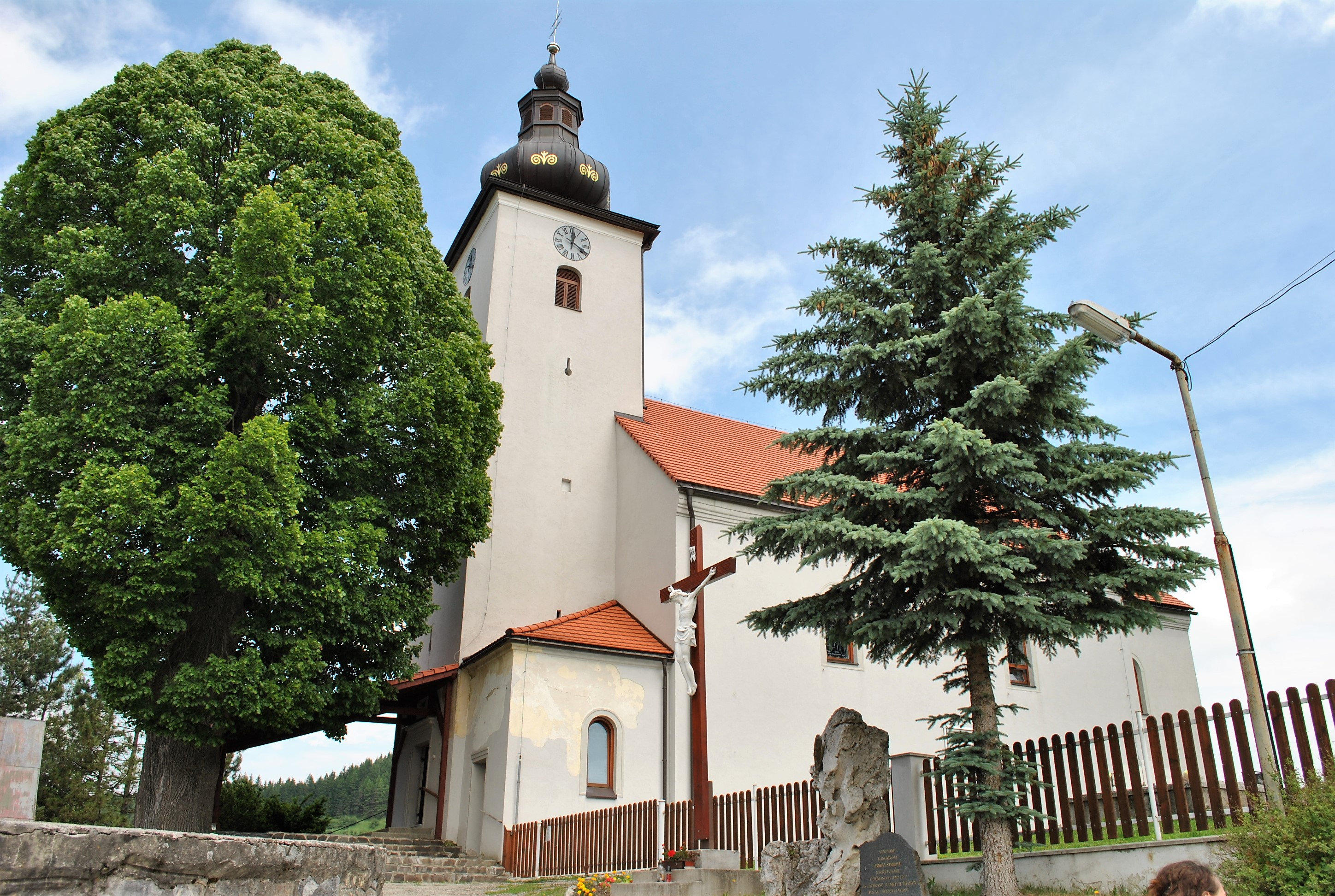 Čičmany - barokový rímsko-katolícky kostol Nájdenia sv. Kríža